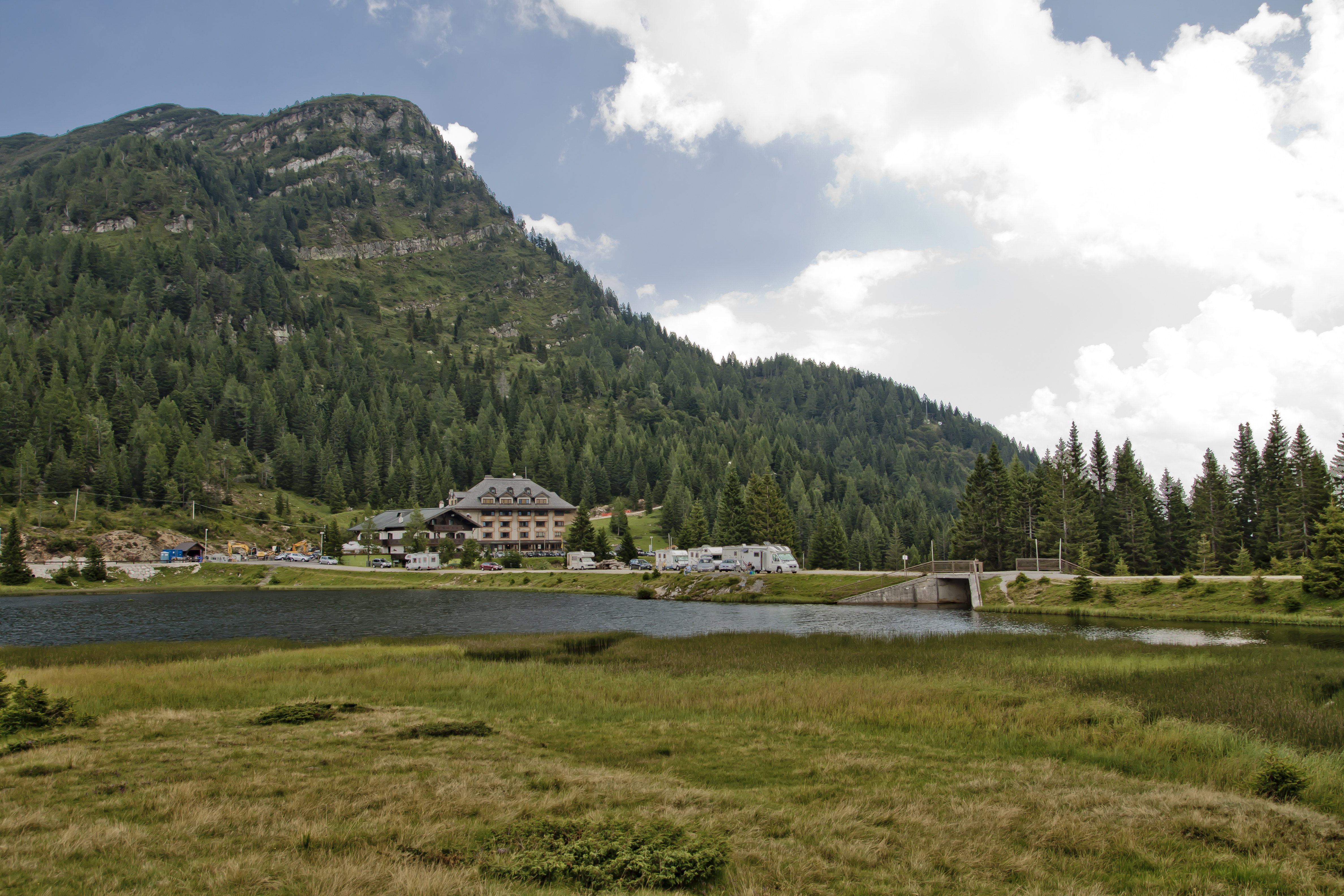 Nassfeld Pass in Summer